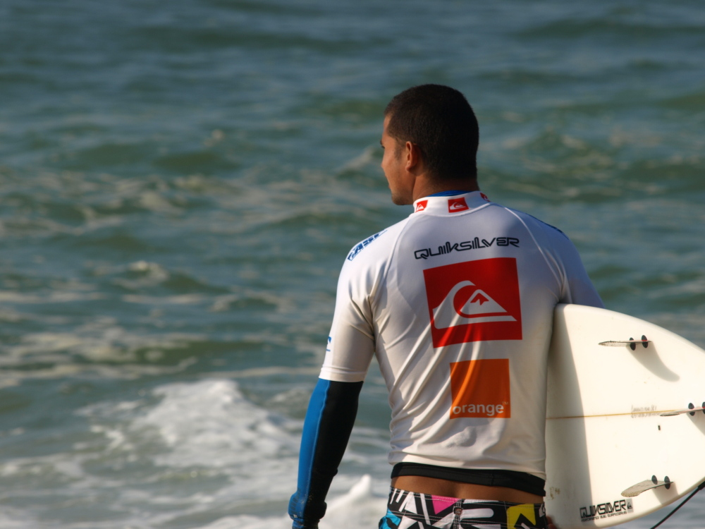 Participant au Quicksilver Pro France 2008, Hossegor, France